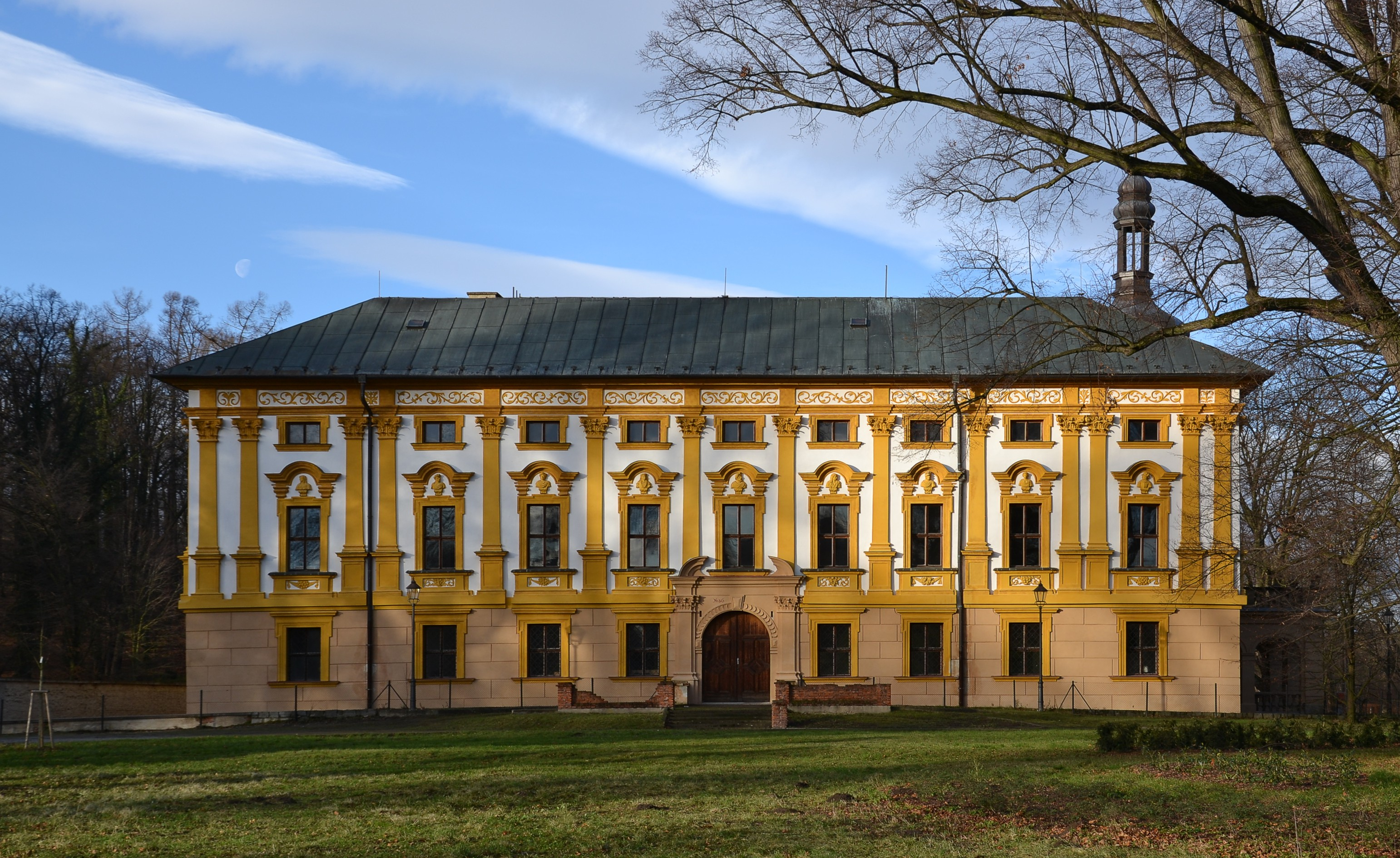 Linhartovy (Geppersdorf) - zámek